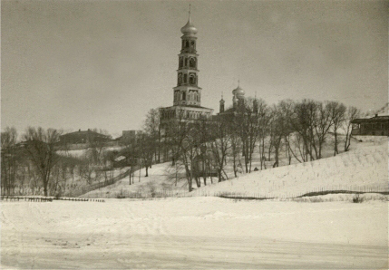 Российская империя. Бузулук. Спасо-Преображенский монастырь.